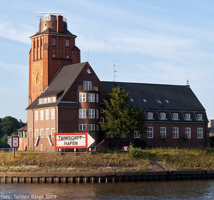 Das Lotsenhaus Seemannshöft auf der gleichnamigen Landzunge in Hamburg-Waltershof ist ein 1913–14 errichteter Klinkerbau mit 24 m hohem Signal- und Beobachtungsturm des Architekten Fritz Schumacher.